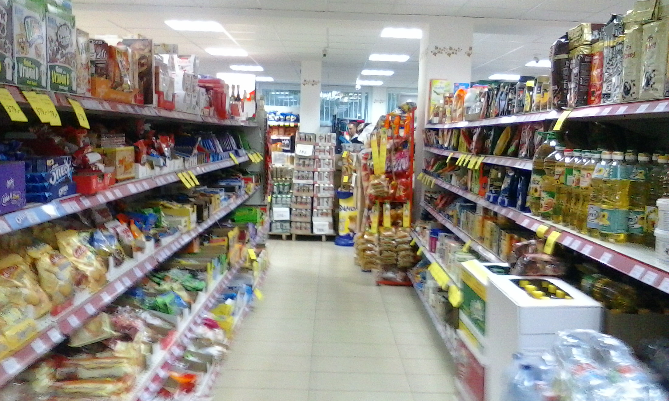 egy borbányai bolt